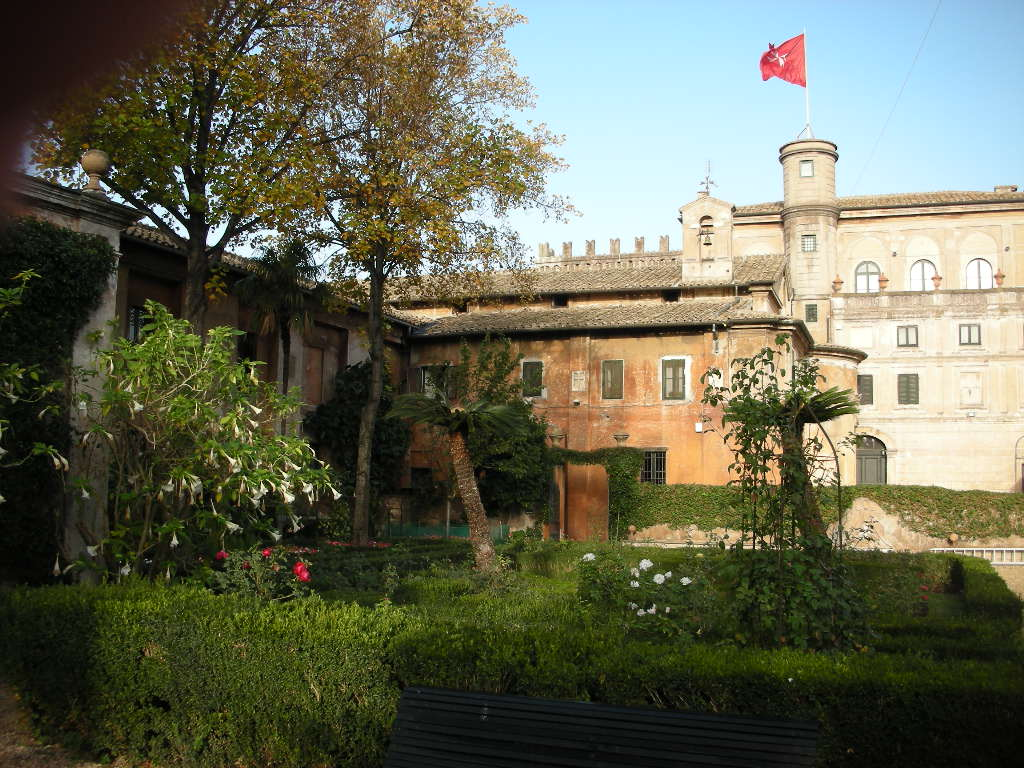 The Garden of the Villa del Priorato dei Cavalieri di Malta (Rome)